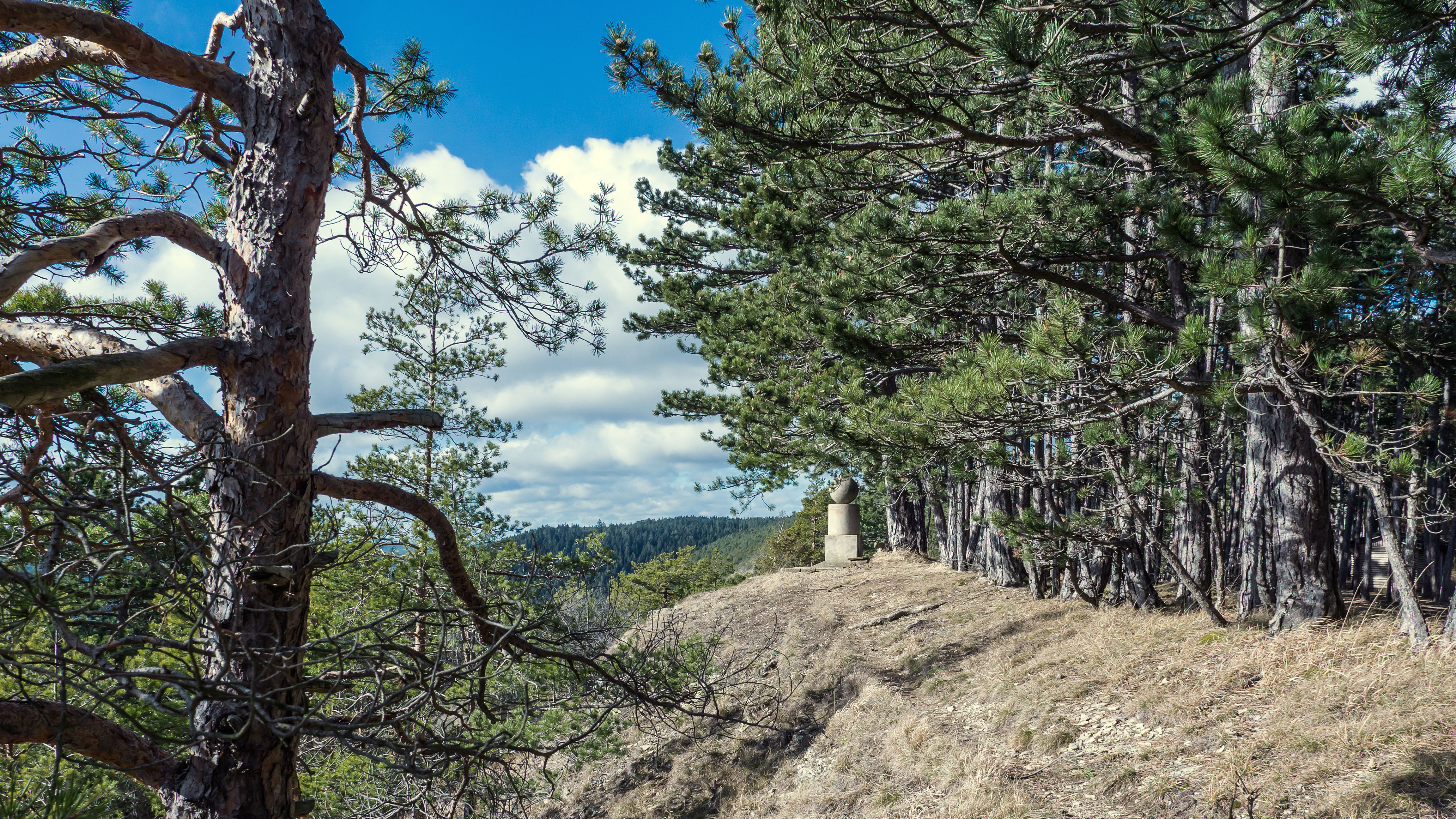 FFH Gebiet 5233-304 Muschelkalk-Landschaft westlich Rudolstadt , Gölitzwände am Fröbeldenkmal DE-TH 5 ; stark gegliederte, vorwiegend südexponierte Muschelkalk-Steilhänge im Südosten der Ilm-Saale-Ohrdrufer-Muschelkalkplatte über Rötsockel, mit artenreichen Trockenstandorten wie Felswänden, Kalkschutthalden, Kalk-Trockenrasen sowie Nadelholzforsten.